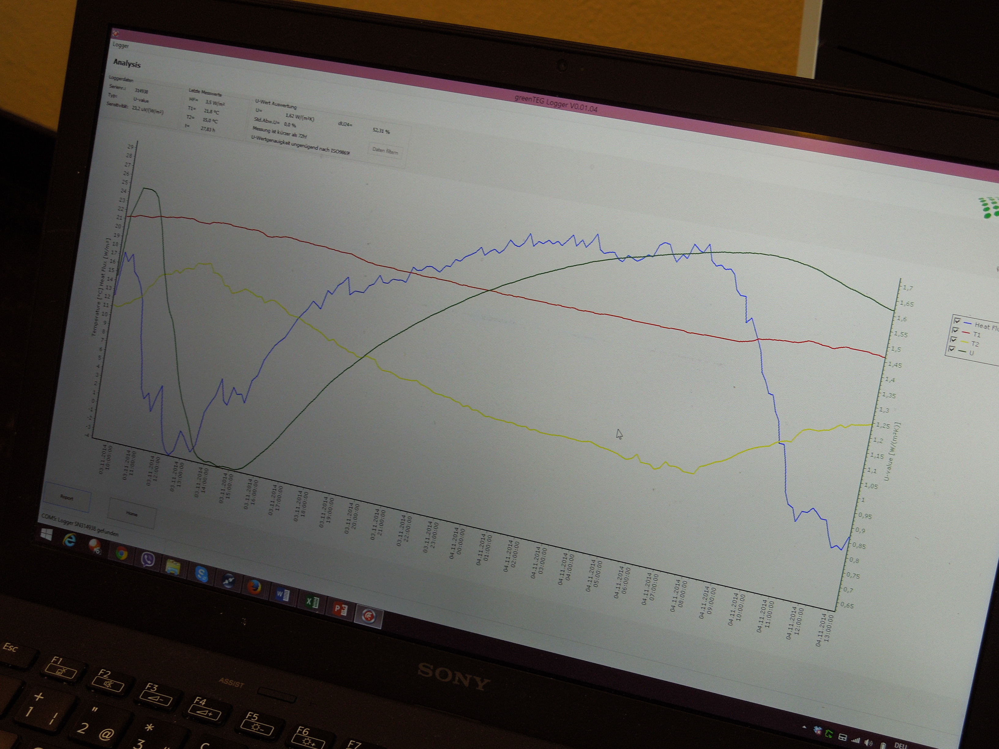 GreenTEG U-value kit: software